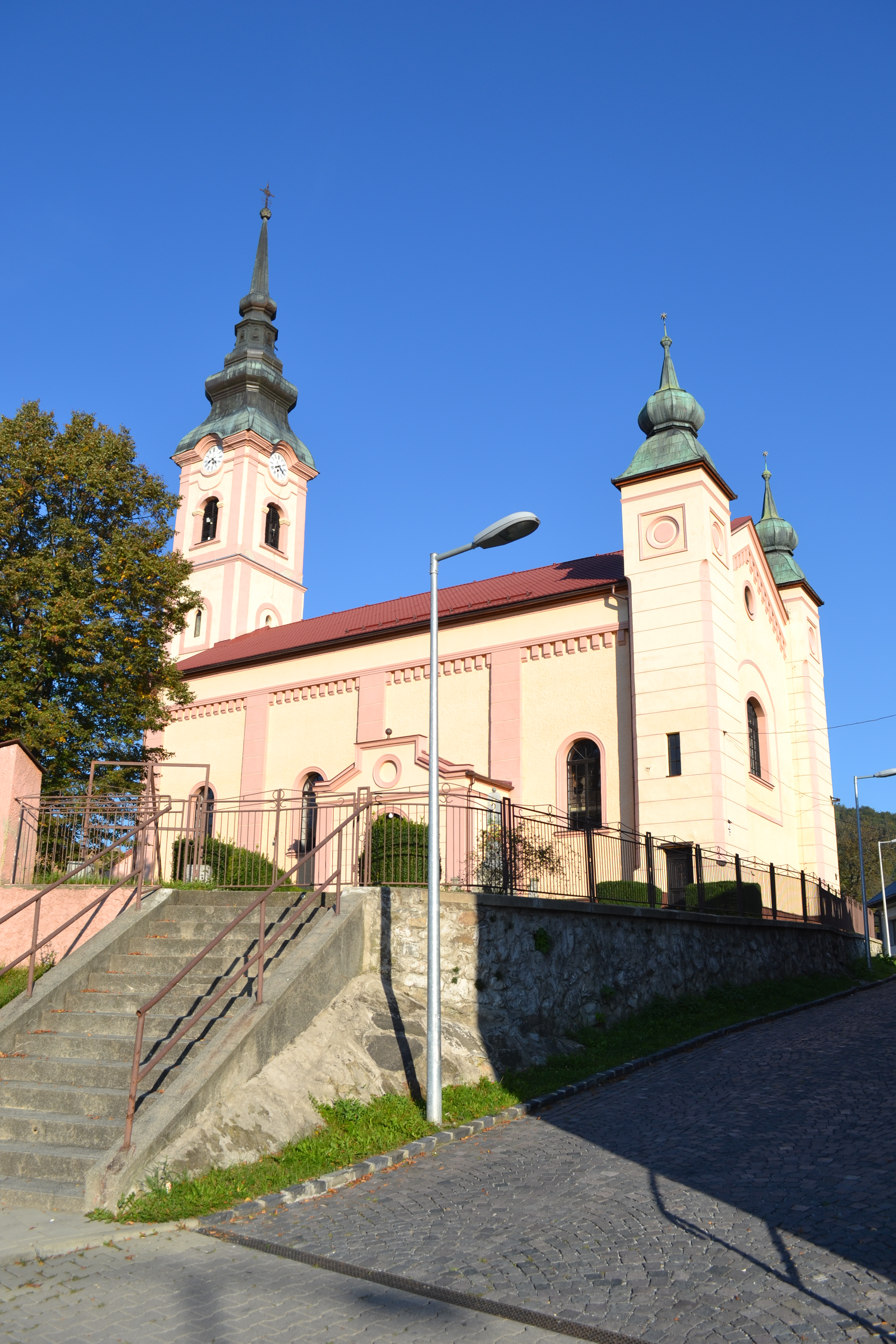 Evanjelický kostol v Kokave nad Rimavicou